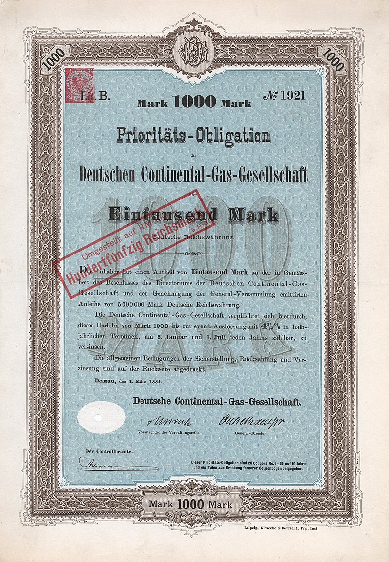 Prioritäts-Obligation über 1000 Mark der Deutschen Continental-Gas-Gesellschaft vom 1. März 1884. Aus einer Neugründung der Konzern-Holding entstand nach Willen der Siemens AG die Continental Elektroindustrie AG, die ebenfalls bestimmte Holding Aufgaben wahrnahm. 1979 wurde die 1855 in Dessau als Unternehmen der Energiebranche gegründete Deutsche Continental-Gas-Gesellschaft in Contigas Deutsche Energie-AG umbenannt. Die Deutsche Continental Gas Gesellschaft, Düsseldorf, hat in diesen Tagen die knappe Mehrheit an der bisher voll in ihrem Besitz gewesenen Continental Elektro Industne AG, Düsseldorf, verkauft. Die Continental Elektroindustrie AG wurde kurze Zeit darauf selbst von der Bergmann Elektro GmbH übernommen. Das Unternehmen Contigas nimmt heute Holdingaufgaben innerhalb des E.ON-Konzerns war.